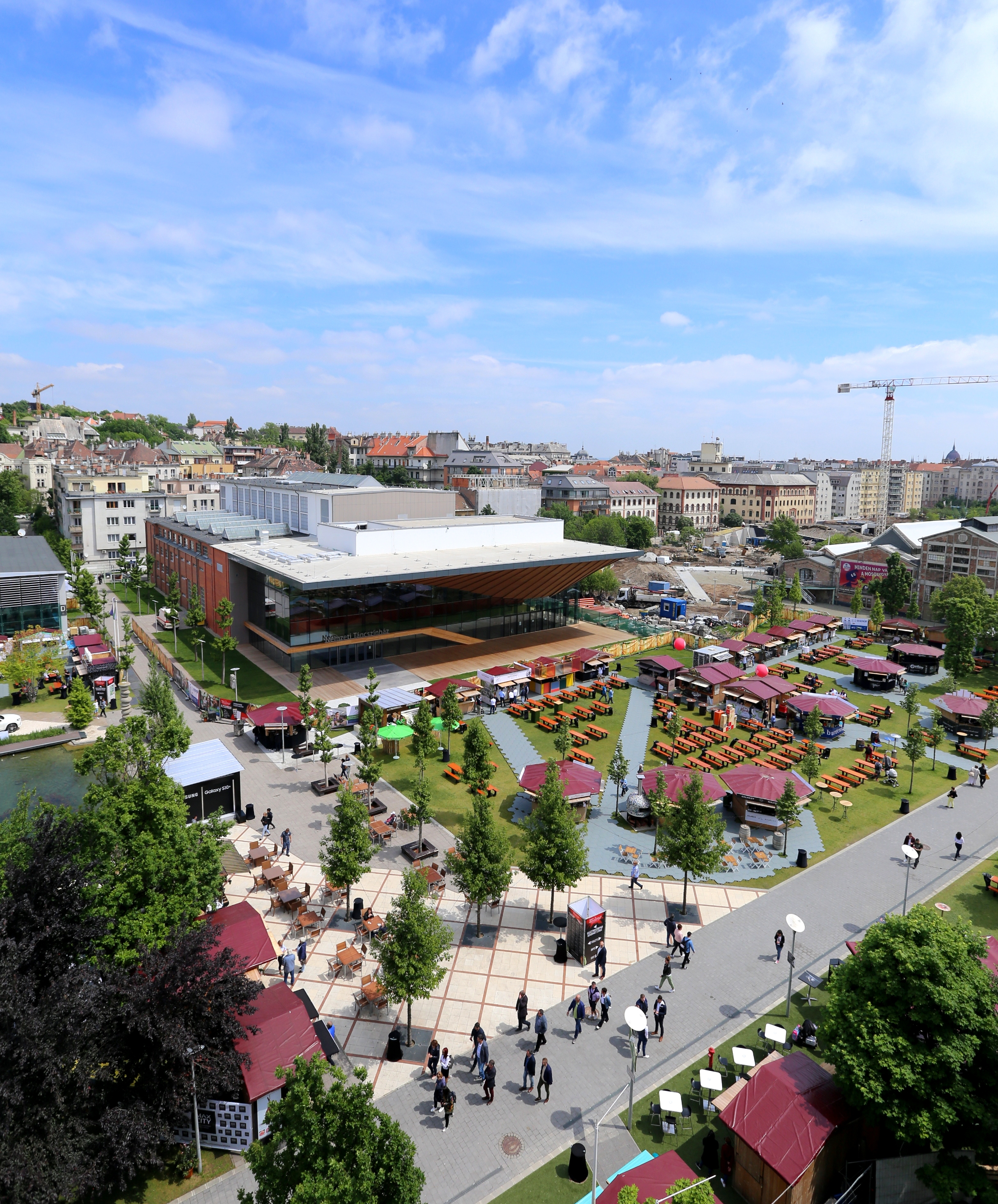 A Nemzeti Tácszinház új épülete a Millenáris Parkban